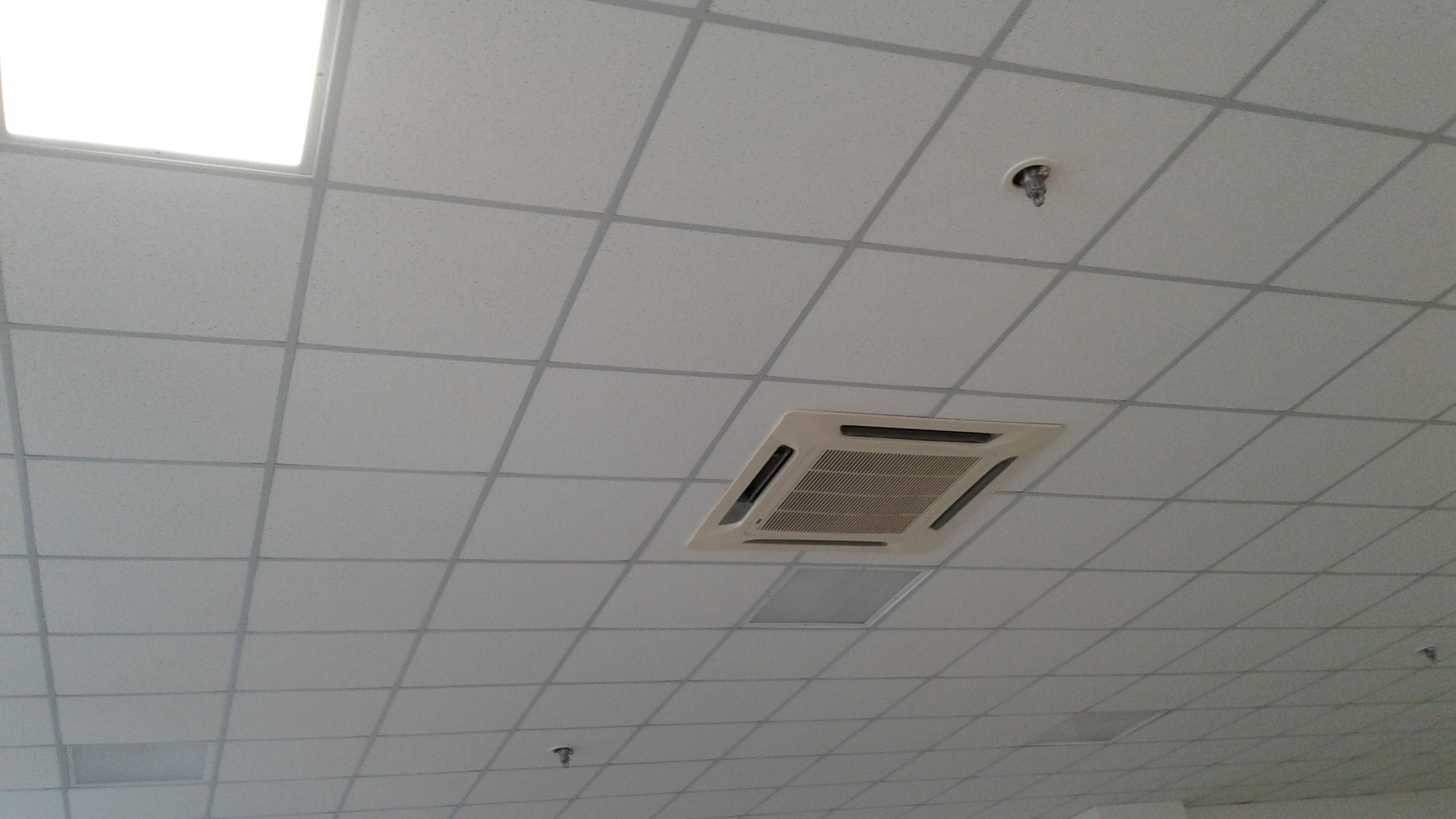 Система пожежогасіння автосалону